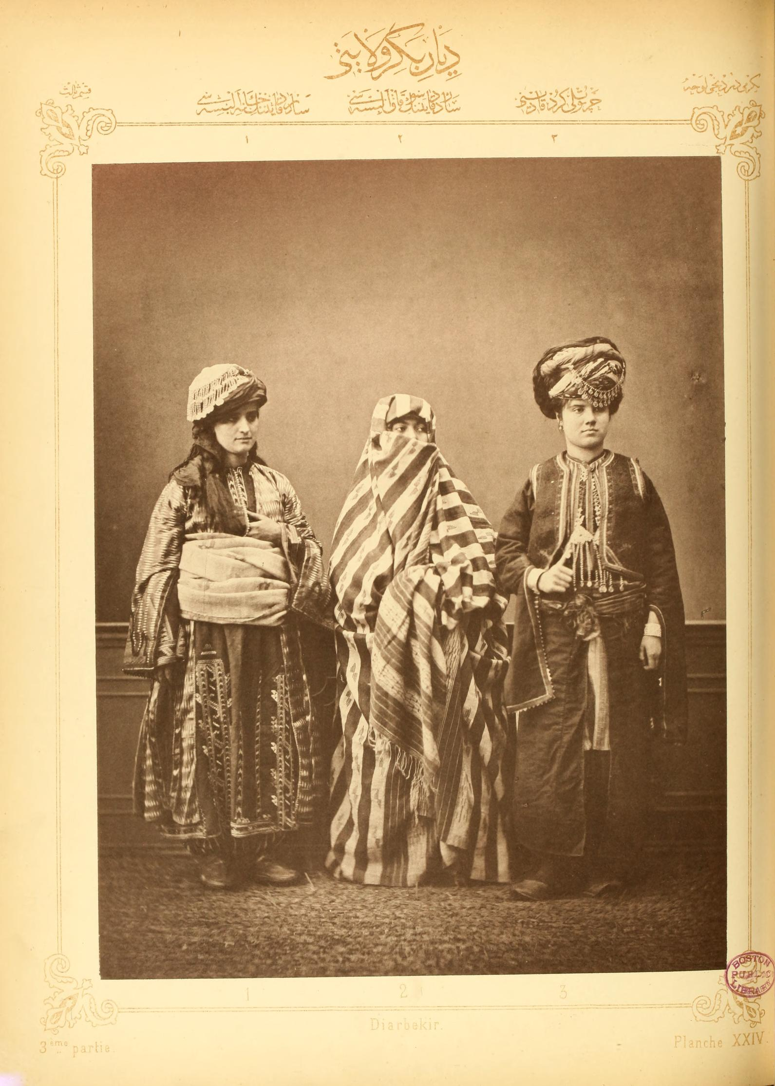 VILAYET DE DIARBÈKIR PLANCHE XXIV: Dame musulmane de Sa'nt chez elle La même en sortie * Femme kurde de Kharpout